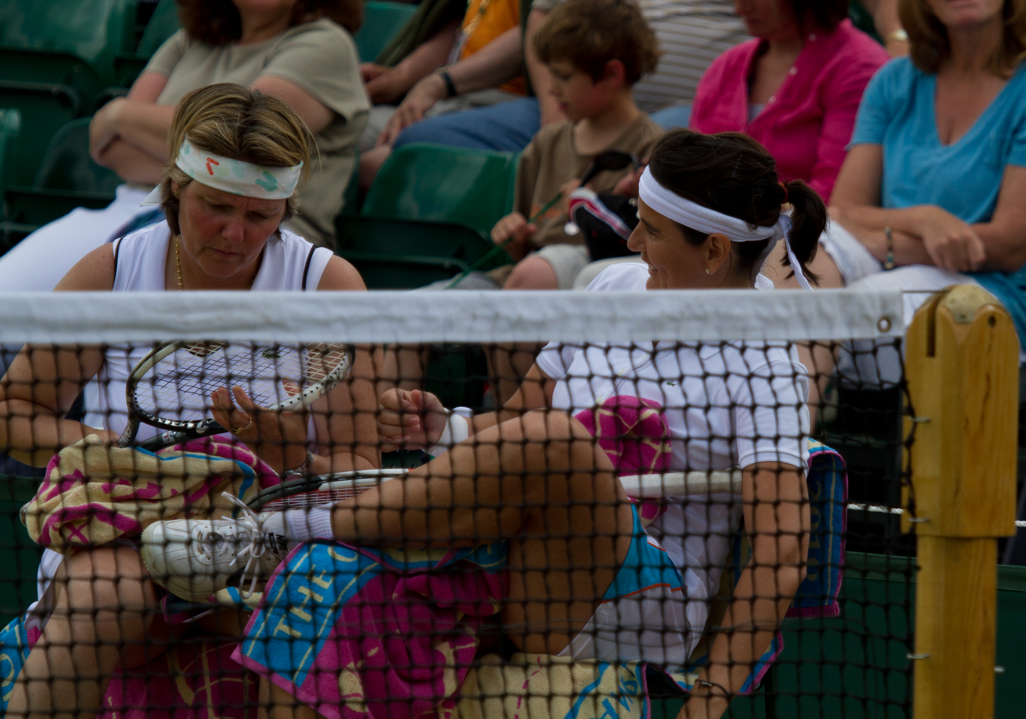 Tauziat-Martinez, Wimbledon 2010